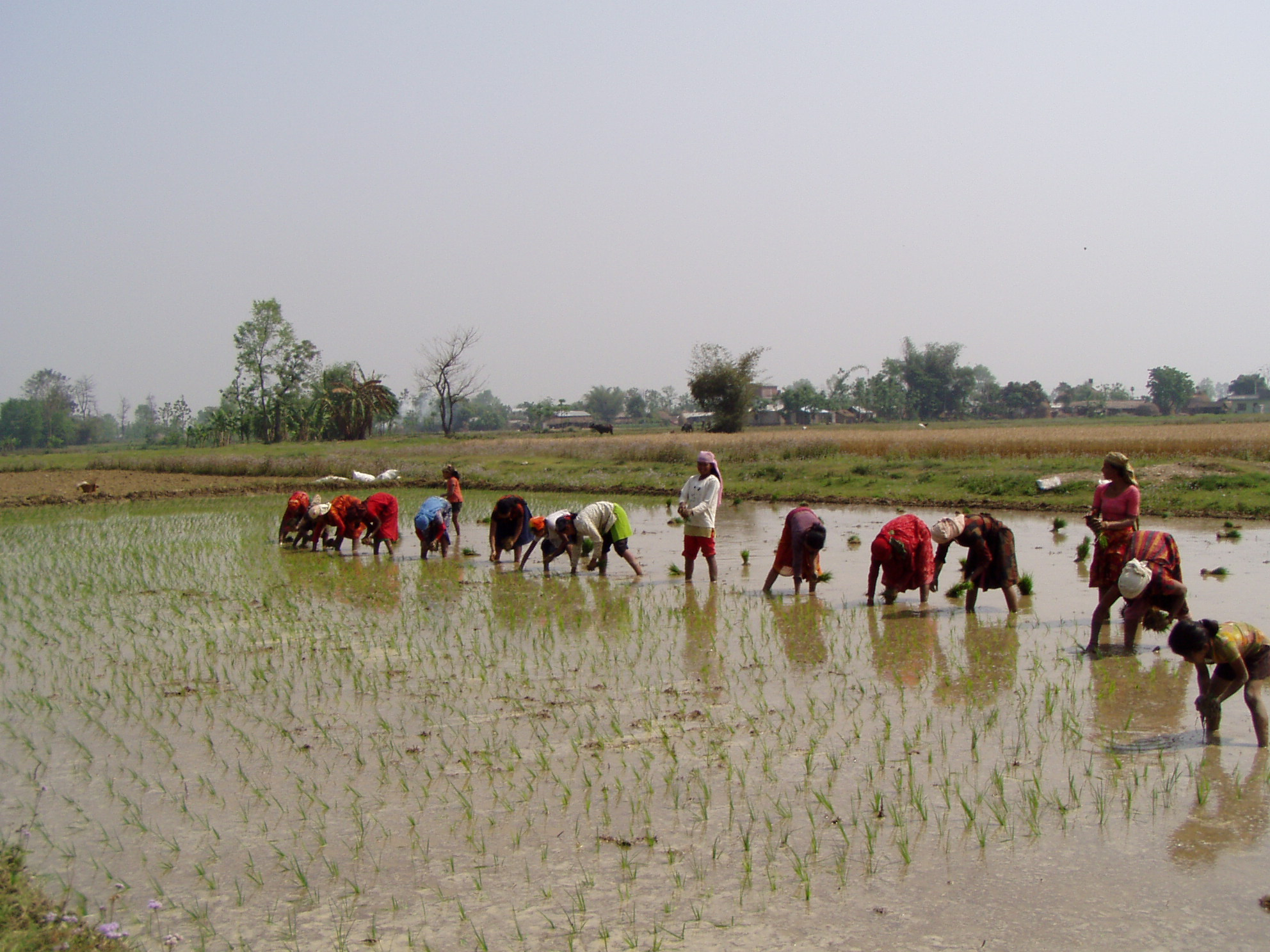 Nepali women planting rice.